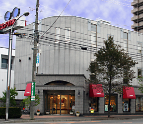 富士メガネ 円山店